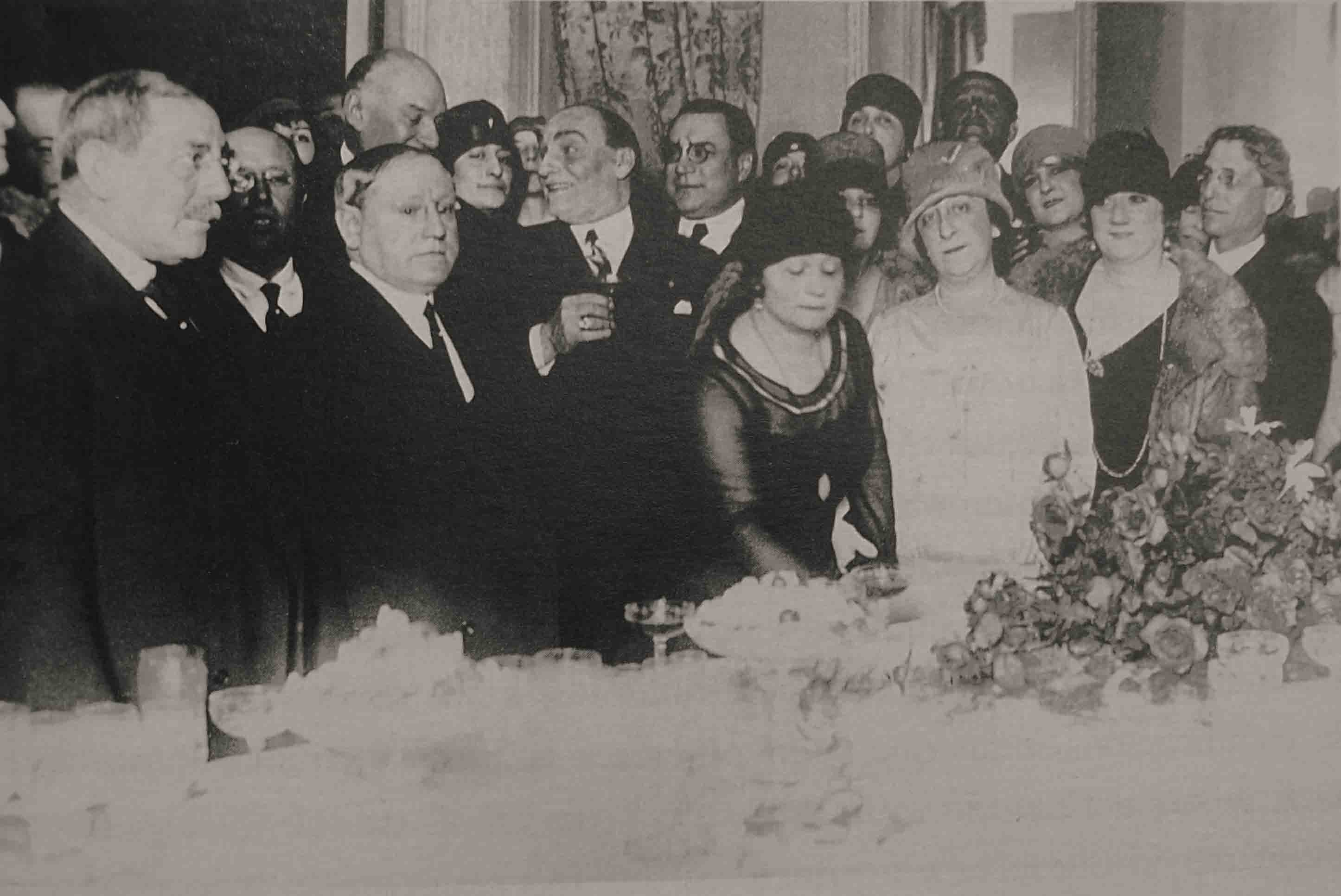 La Casa del Teatro es visitada por MT de Alvear y Regina Pacini, Florencio Parravicini y Pierina Dealessi.